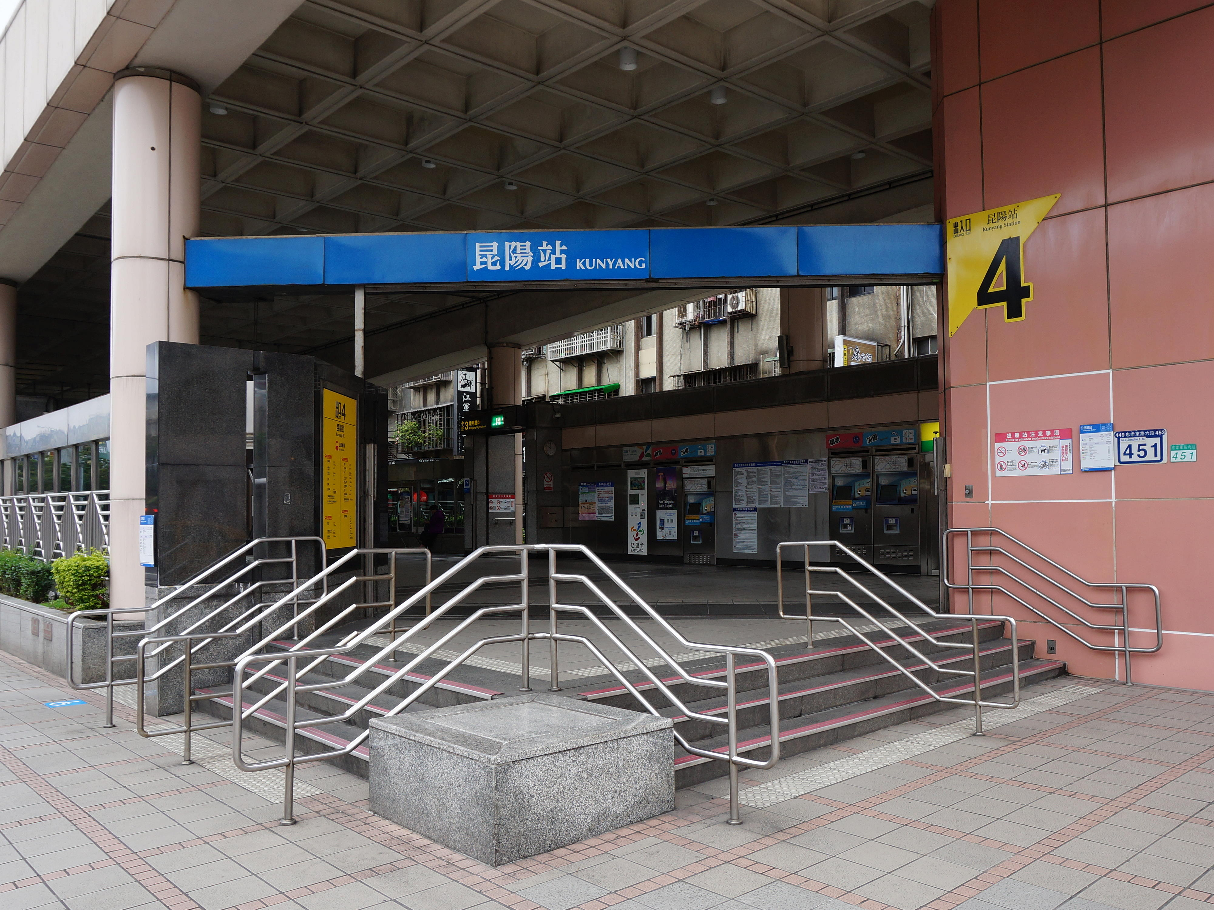 臺北捷運昆陽站四號出口。